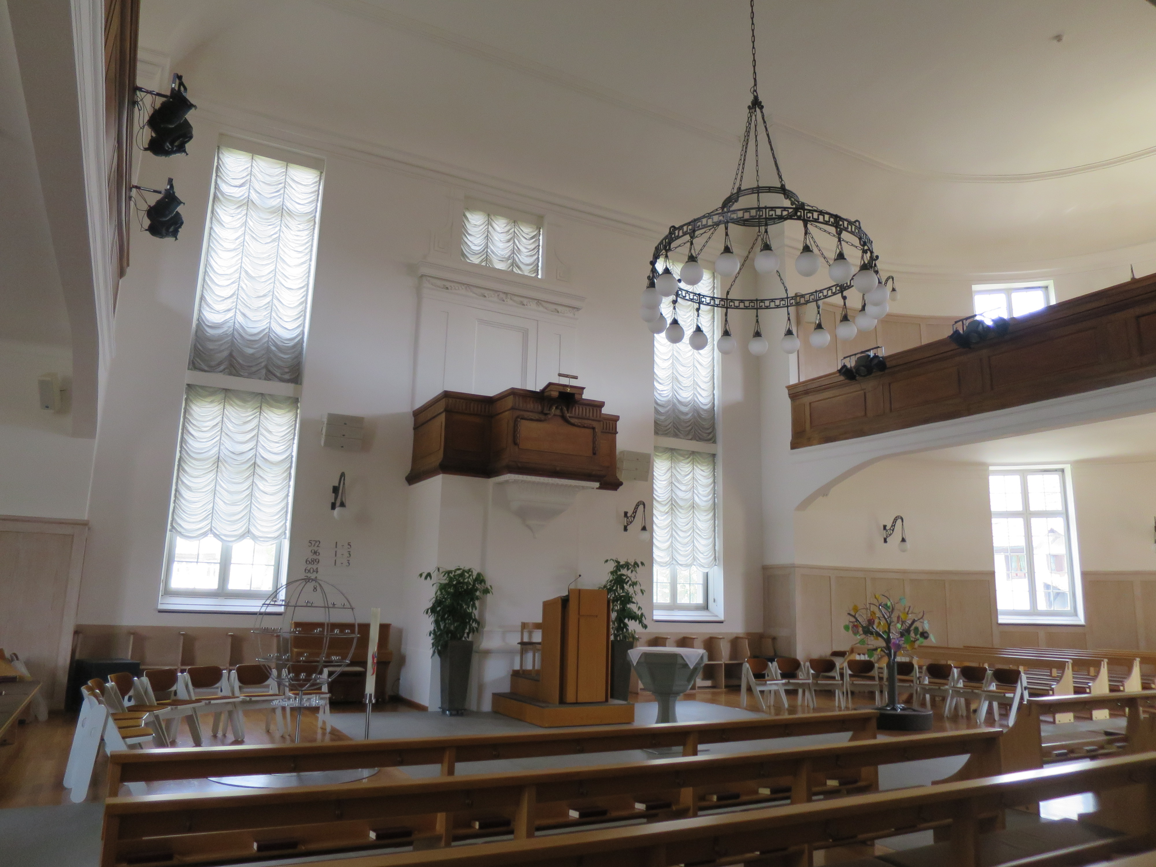 Ansicht der reformierten Kirche Embrach